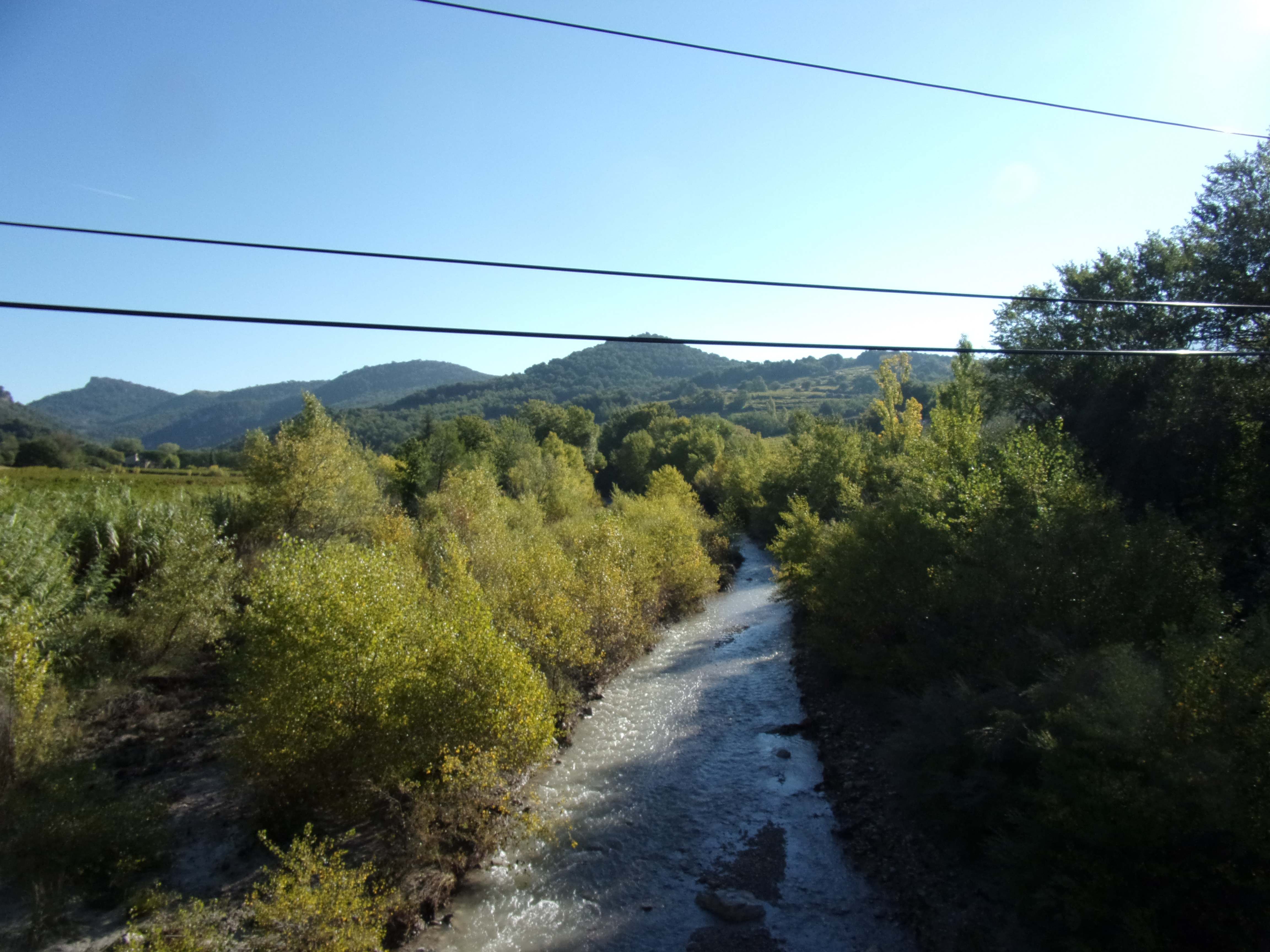 à la limite entre Merindol-les-Oliviers et Mollans-sur-Ouvèze, au sud de Propiac